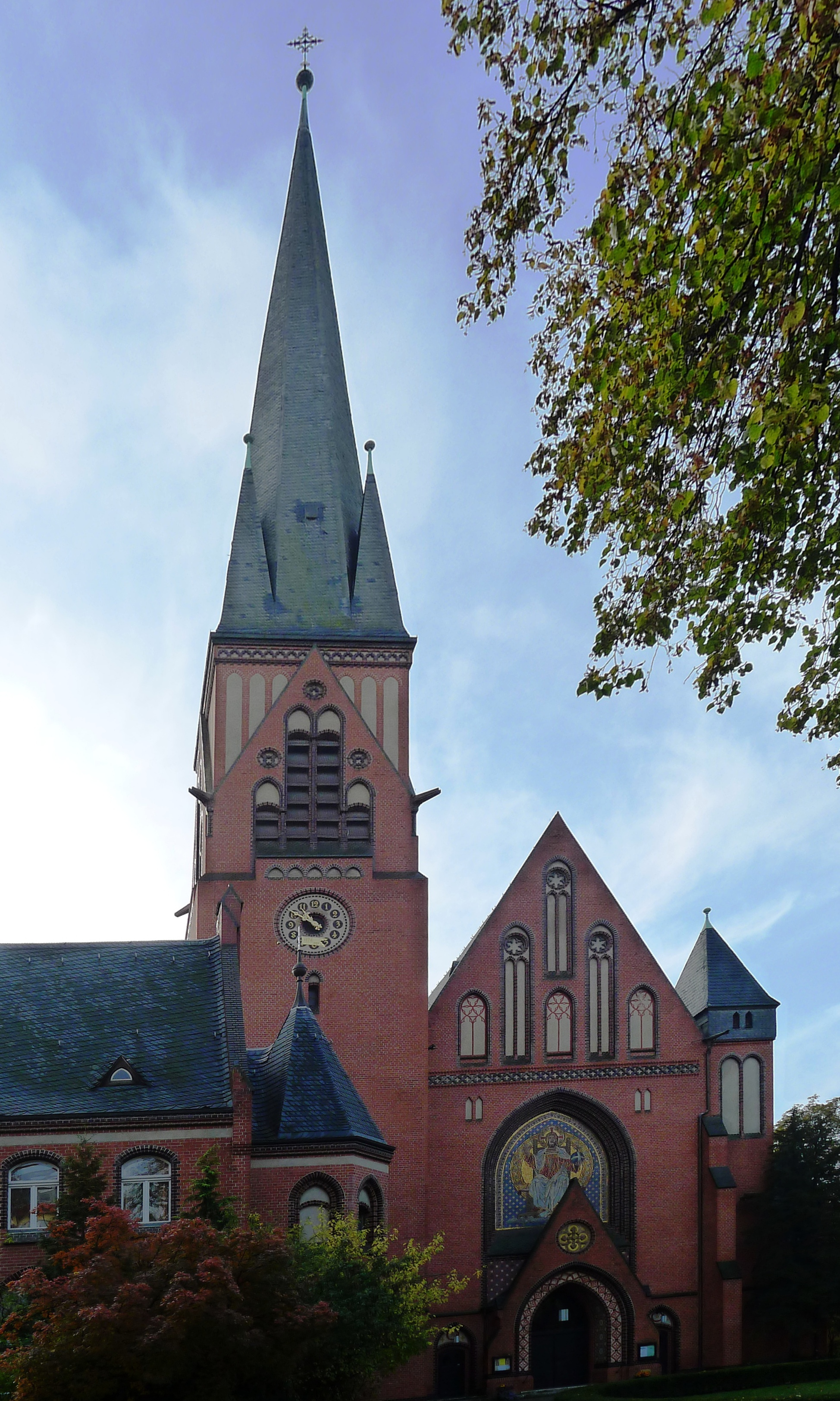 Blick auf Pfarrhaus links, Turm in der Mitte und Giebel des Kirchenschiffs rechts